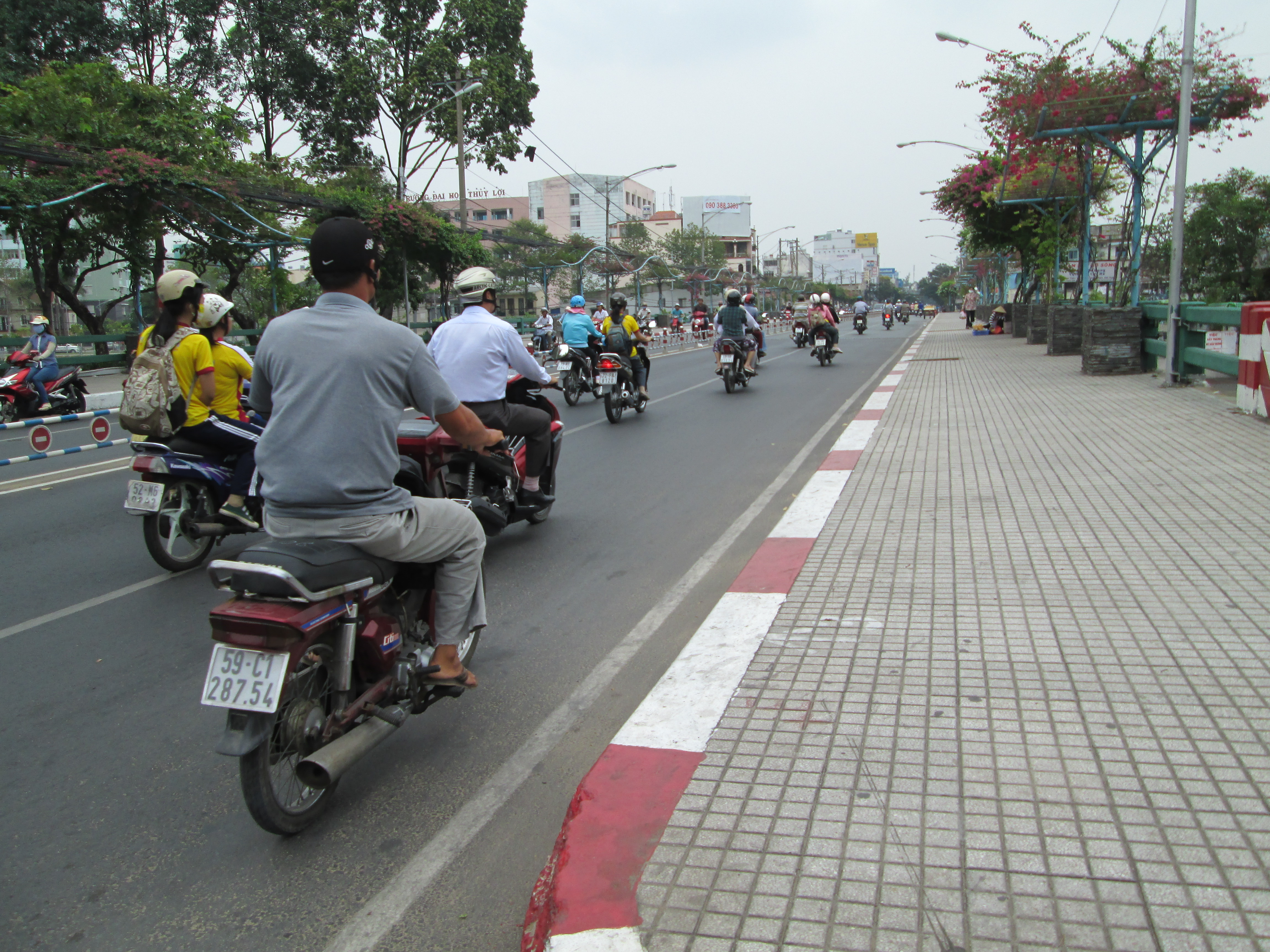 HÌnh chụp cầu Thị Nghè